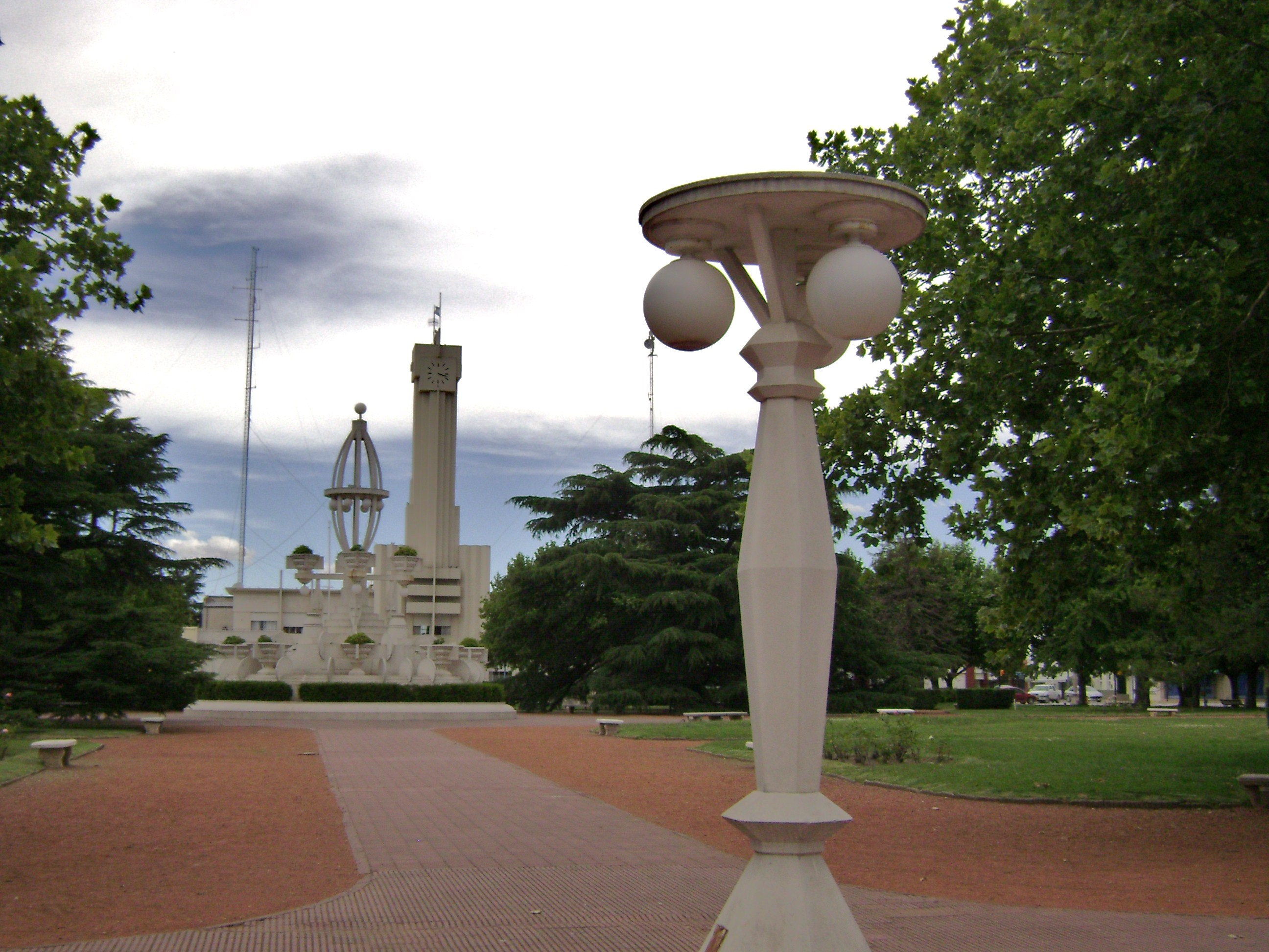 Vista de la Plaza Central y el Edificio de la Municipalidad de Laprida